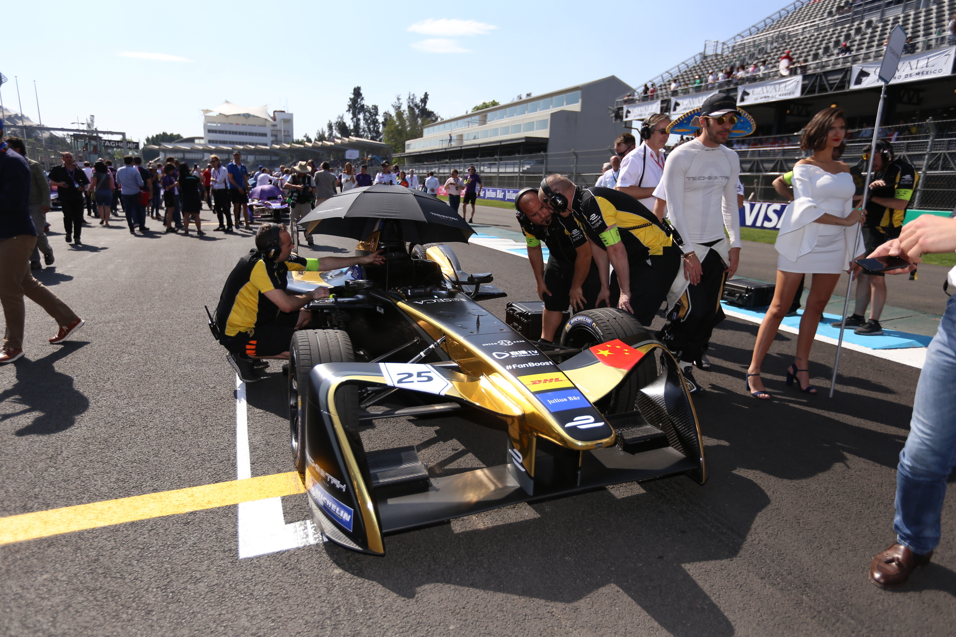 Formula E 2017